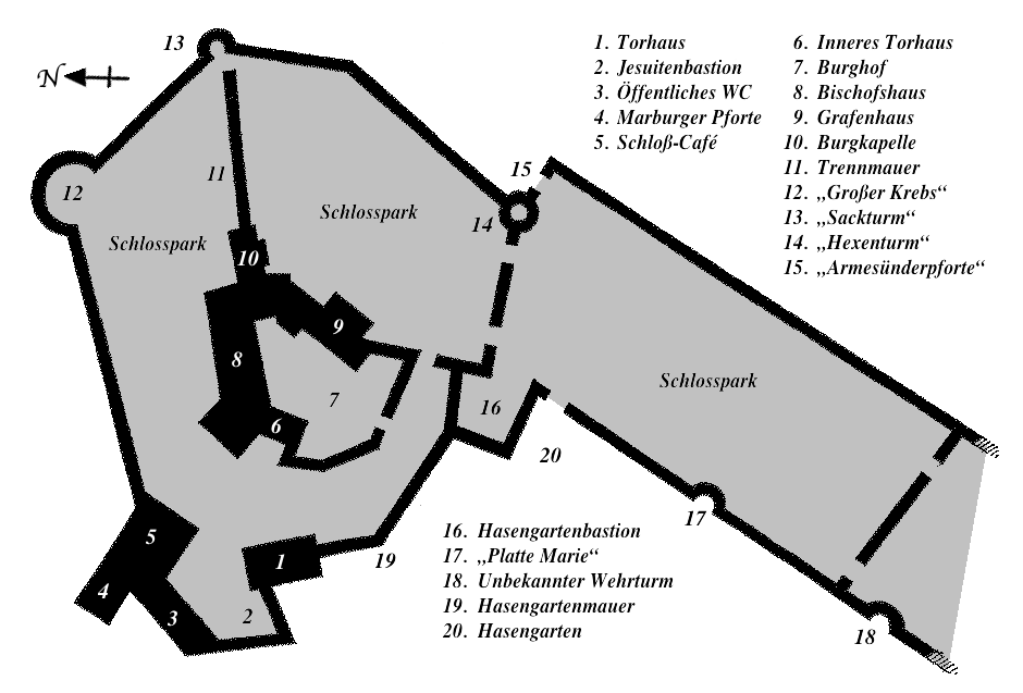 Oberes Schloss in Siegen/Westfalen: Lageplan der Bauten im Zustand 2010 (ohne Alten Friedhof und südöstliche Bastion). Digital nachbearbeitete Freihandzeichnung auf Grundlage eines Lageplanes des Grünflächenamtes der Stadt Siegen.